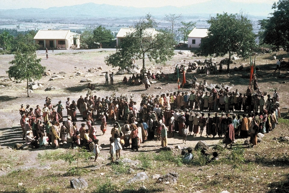 Maliana em festa